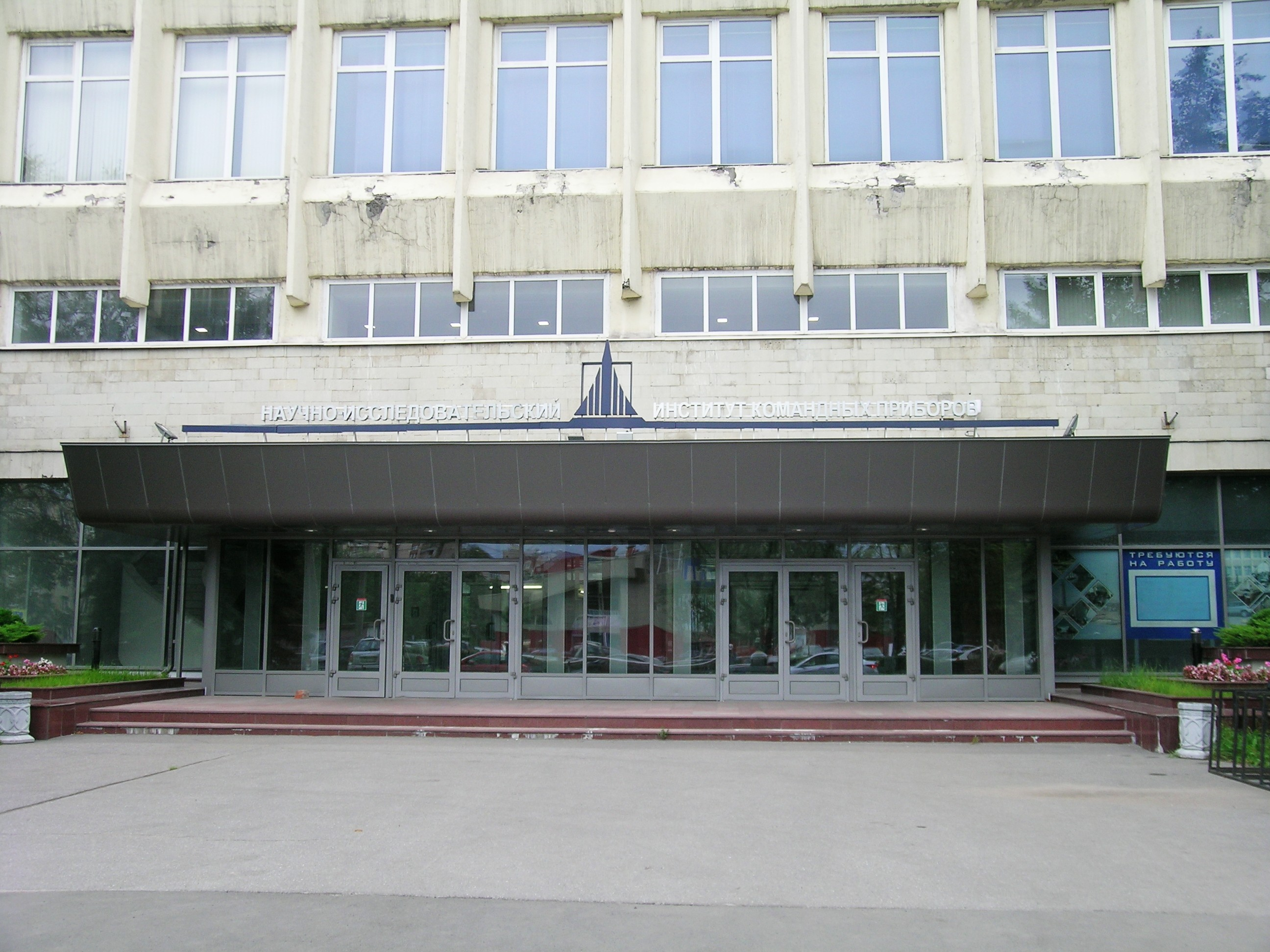 Научно-исследовательский институт командных приборов. 198216, Санкт-Петербург, Трамвайный проспект, д.16